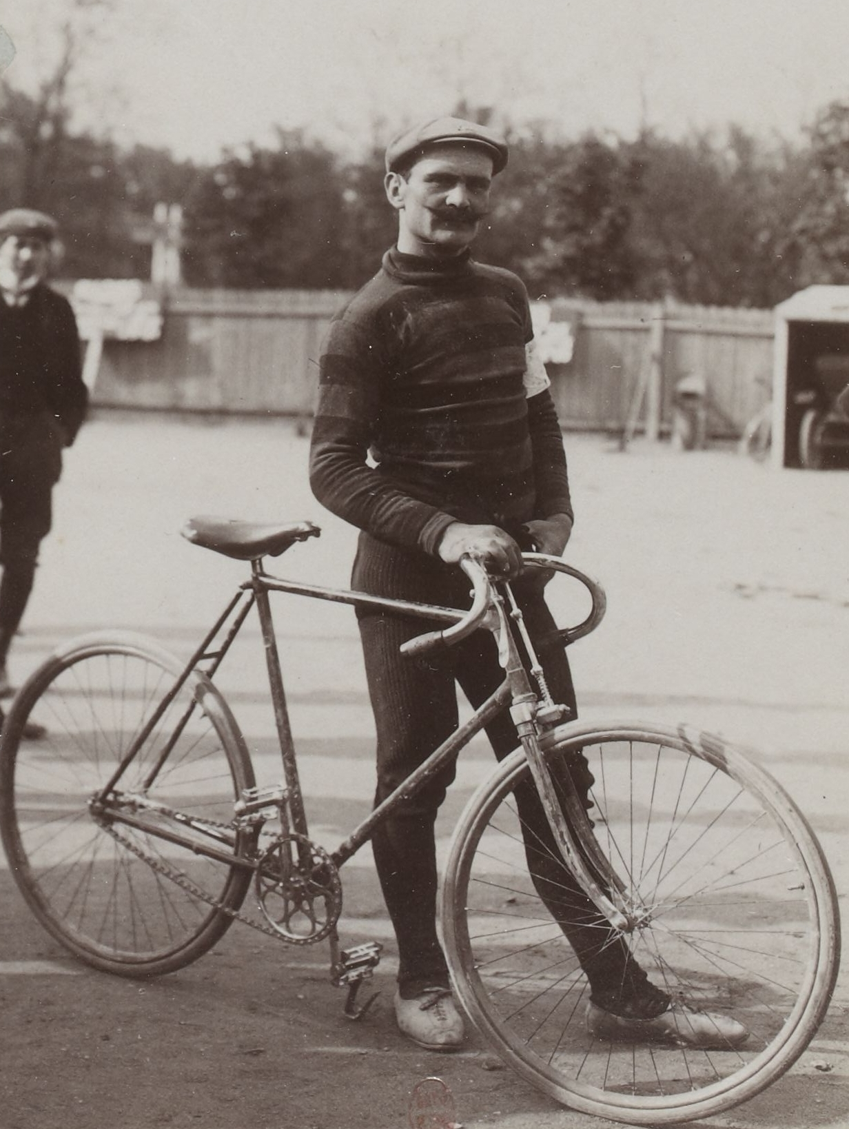 [Collection Jules Beau. Photographie sportive] : T. 15. Année 1901 / Jules Beau : F. 27v. Course Bordeaux - Paris, 5 mai 1901